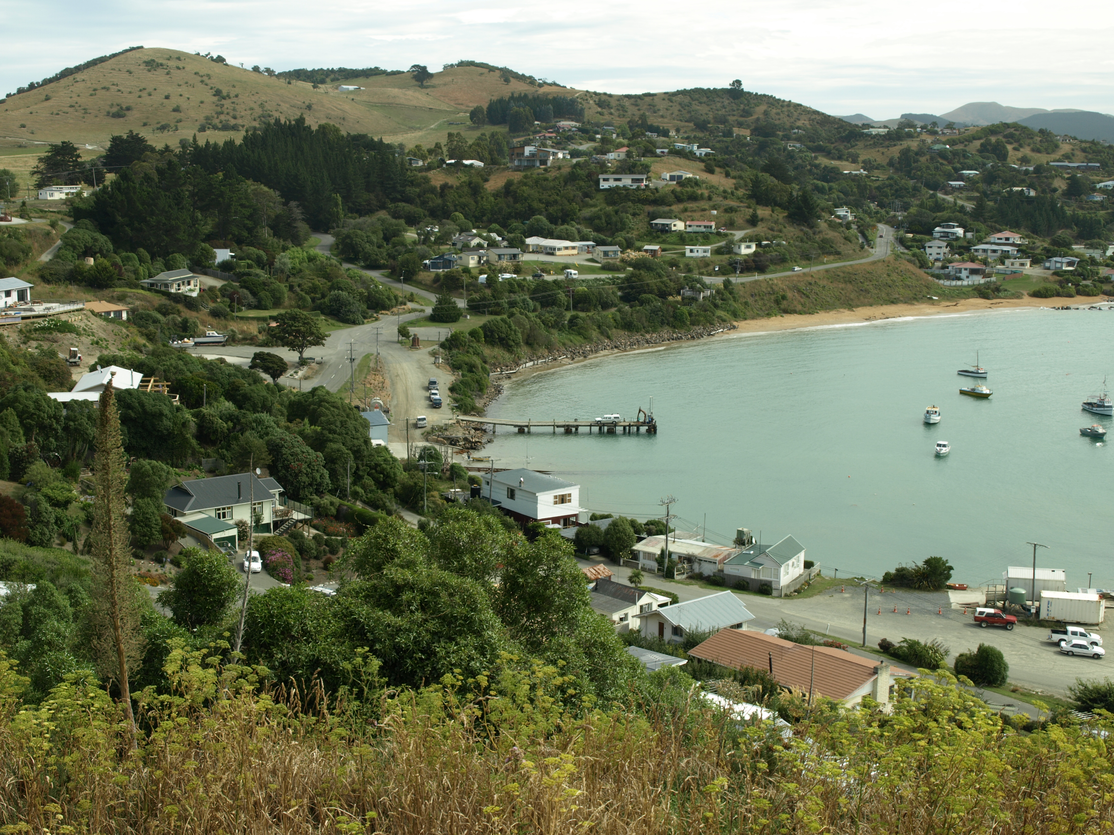 Moeraki, Otago Region, New Zealand